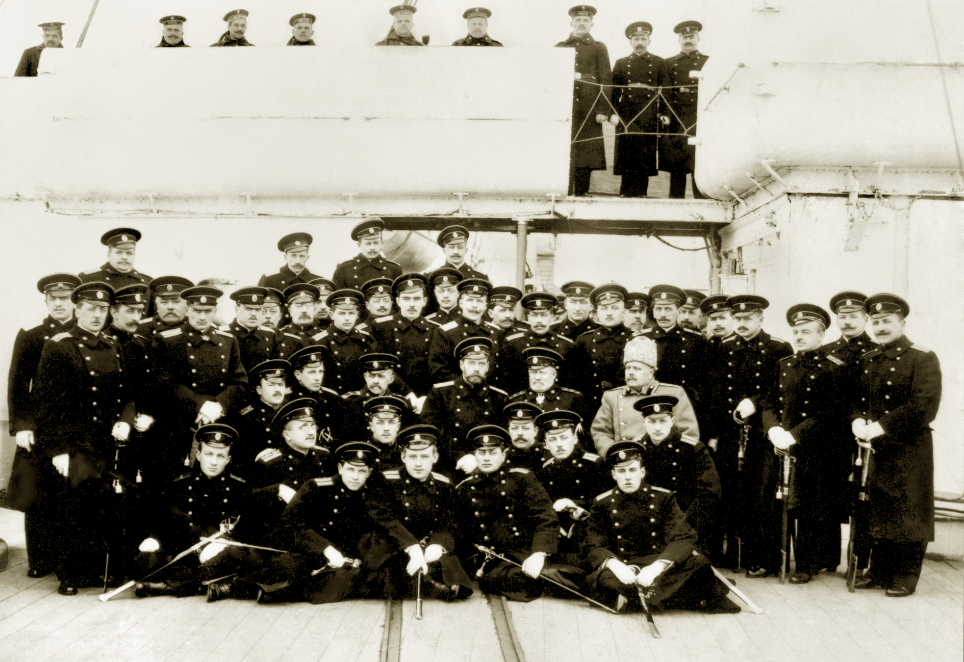 15.01.1915 г. Николай II на крейсере "Россия" среди офицеров штаба Балтийского флота. Слева от императора – Л. Кербер, справа – Н. О. Эссен. Стоят: крайний справа - И. И. Ренгартен, рядом – князь Черкасский, затем – М. А. Кедров и А. С. Максимов. 5-й слева – А. В. Колчак. Рядом с Н. О. Эссеном, вероятно, обер-гофмаршал императорского двора граф П. К. Бенкендорф.